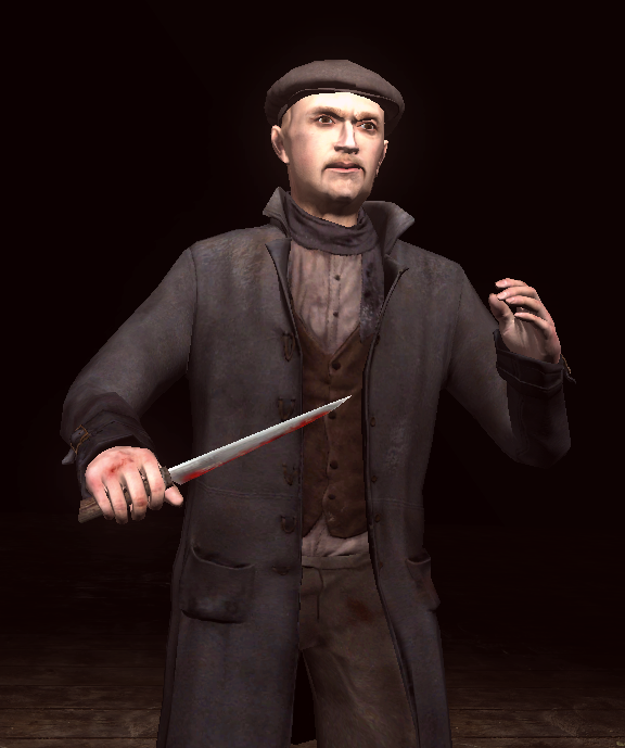 Capture d'écran du jeu Sherlock Holmes contre Jack l'Éventreur. Jacob Levy, mimant ses crimes devant Holmes au cours de la cinématique de conclusion.